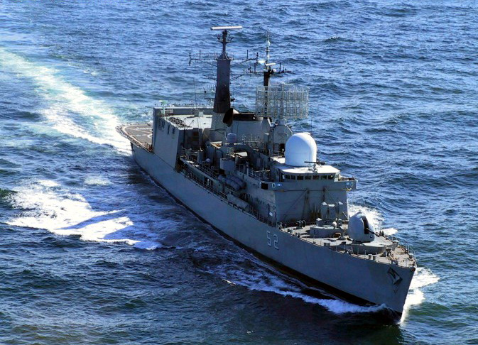 Transporte Multipropósito Rápido (LCC [H]) (ex DDG Type 42) ARA "Hércules" (B-52) - TRHE